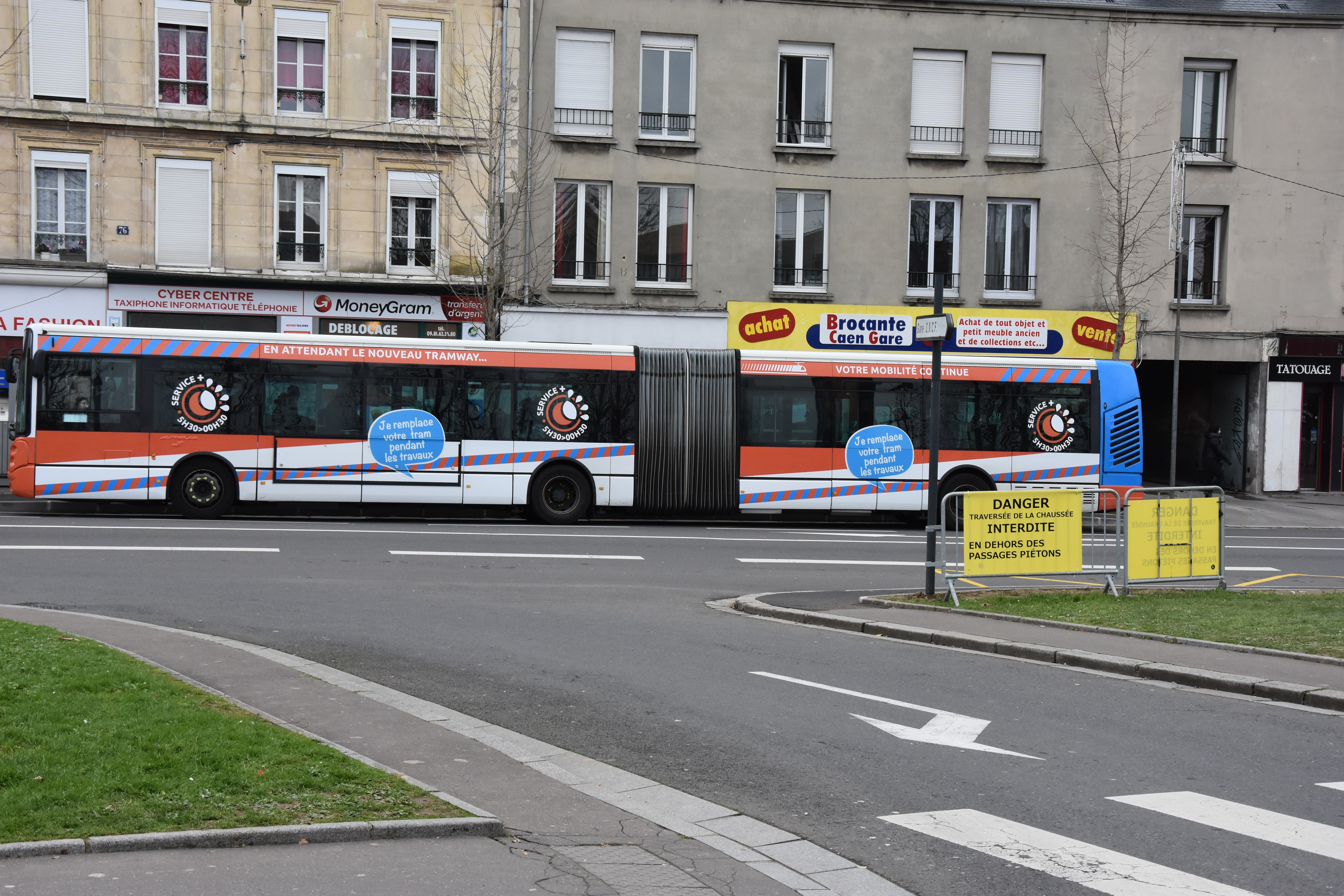 Bus de substitution à l'arrêt provisoire gare SNCF janvier 2018